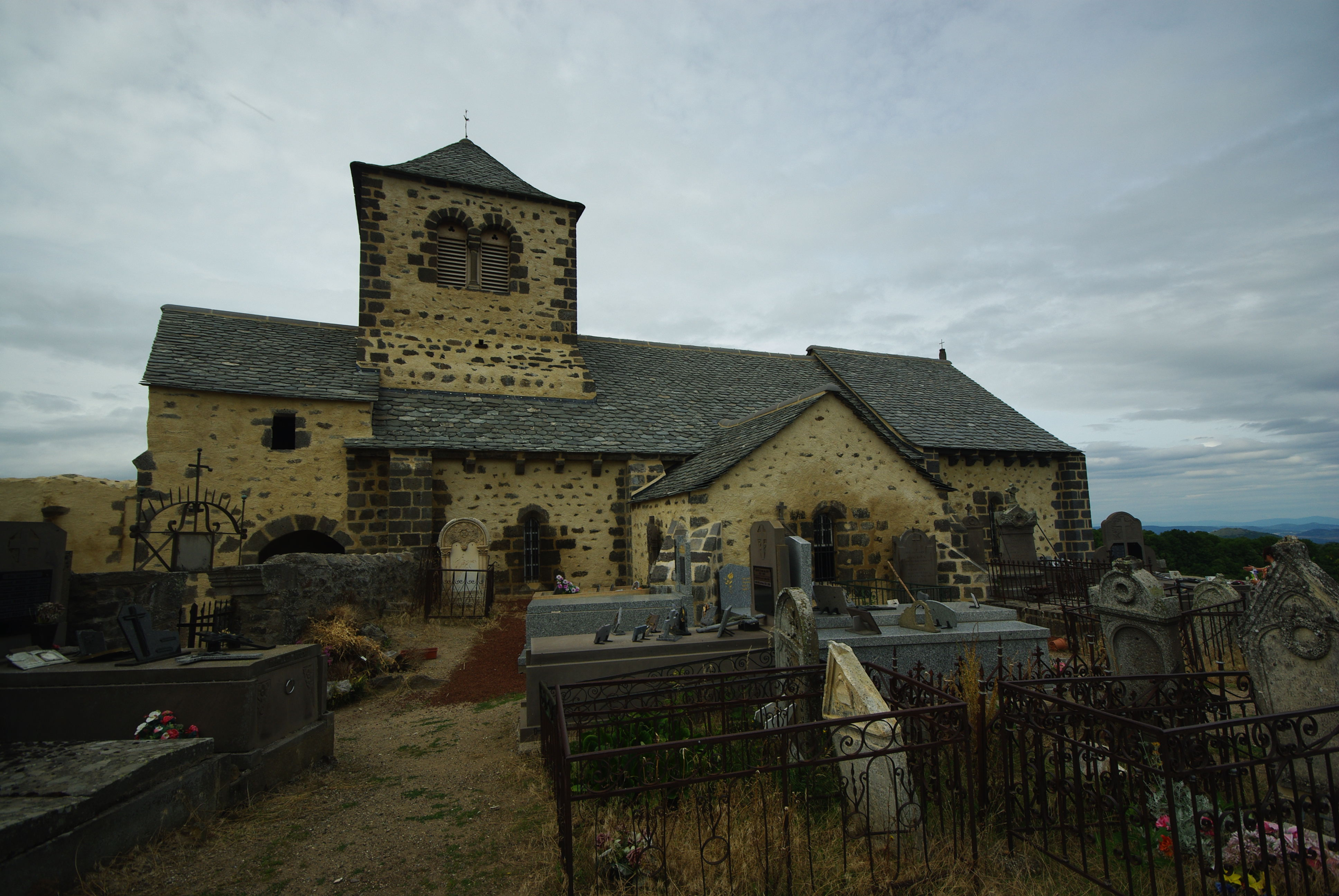 Église Saint-Géraud de Dauzat-sur-Vodable